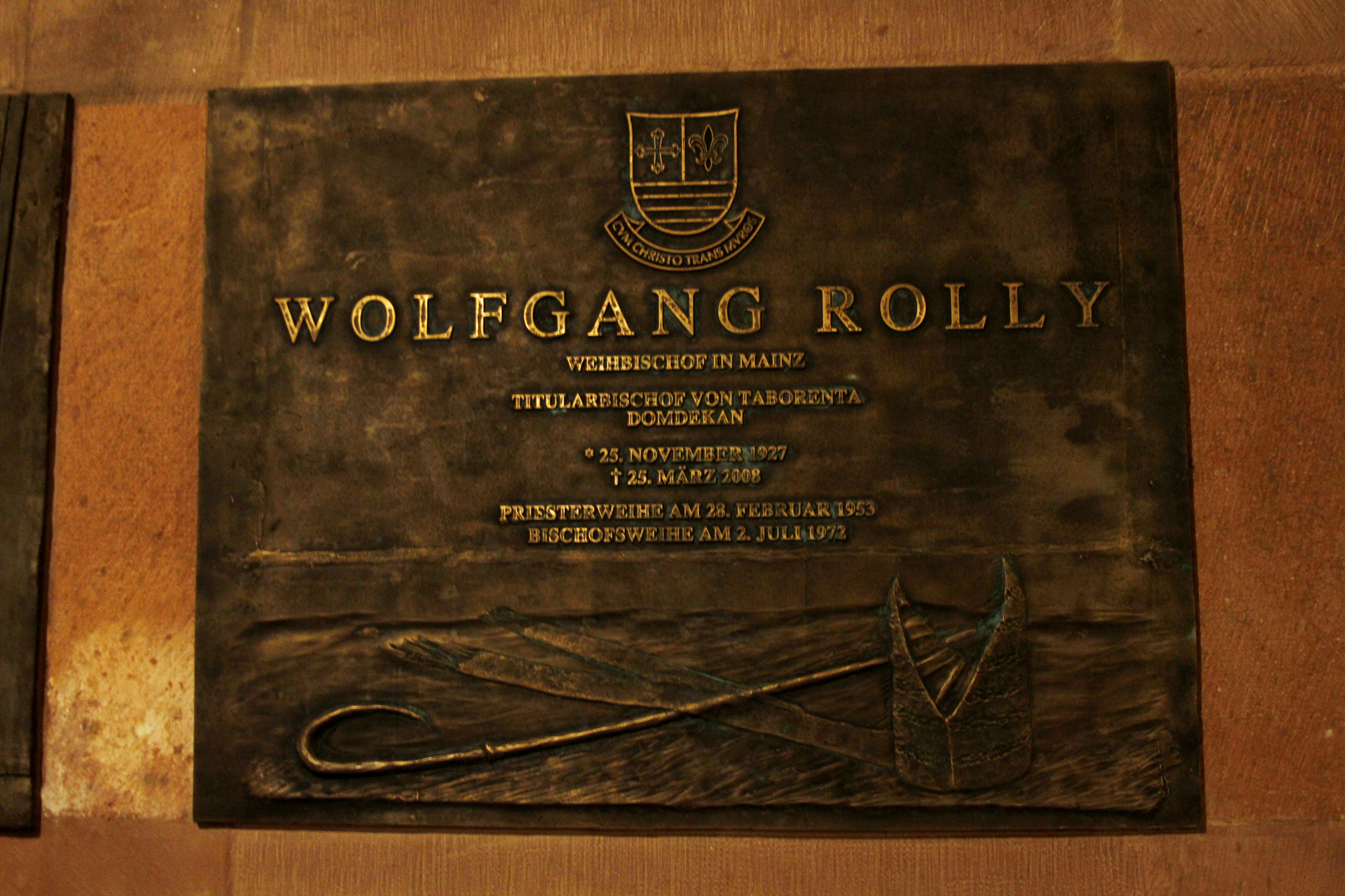 Mainz Cathedral - Mainz - Germany